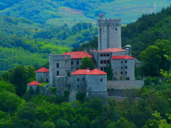 Branik, Grad Rihemberk